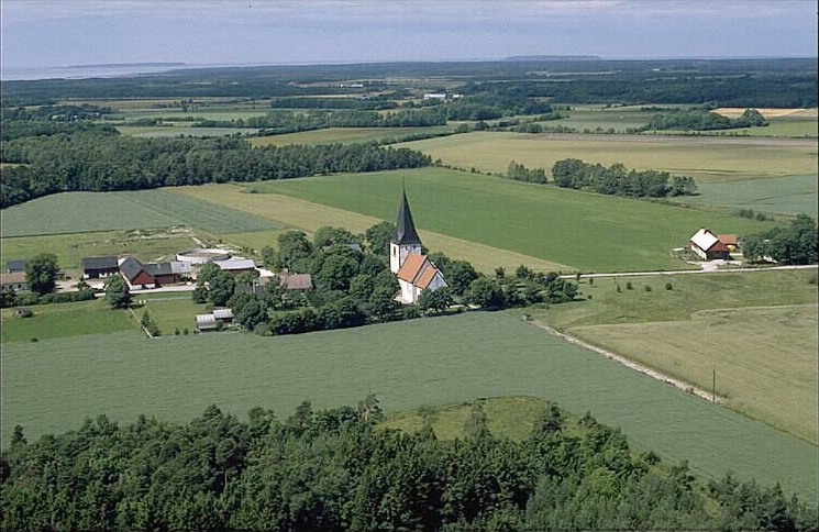 Motiv: Silte kyrka Nyckelord: Flygbilder, Riksintressen Kategori: Kyrkomiljö Silte kyrka